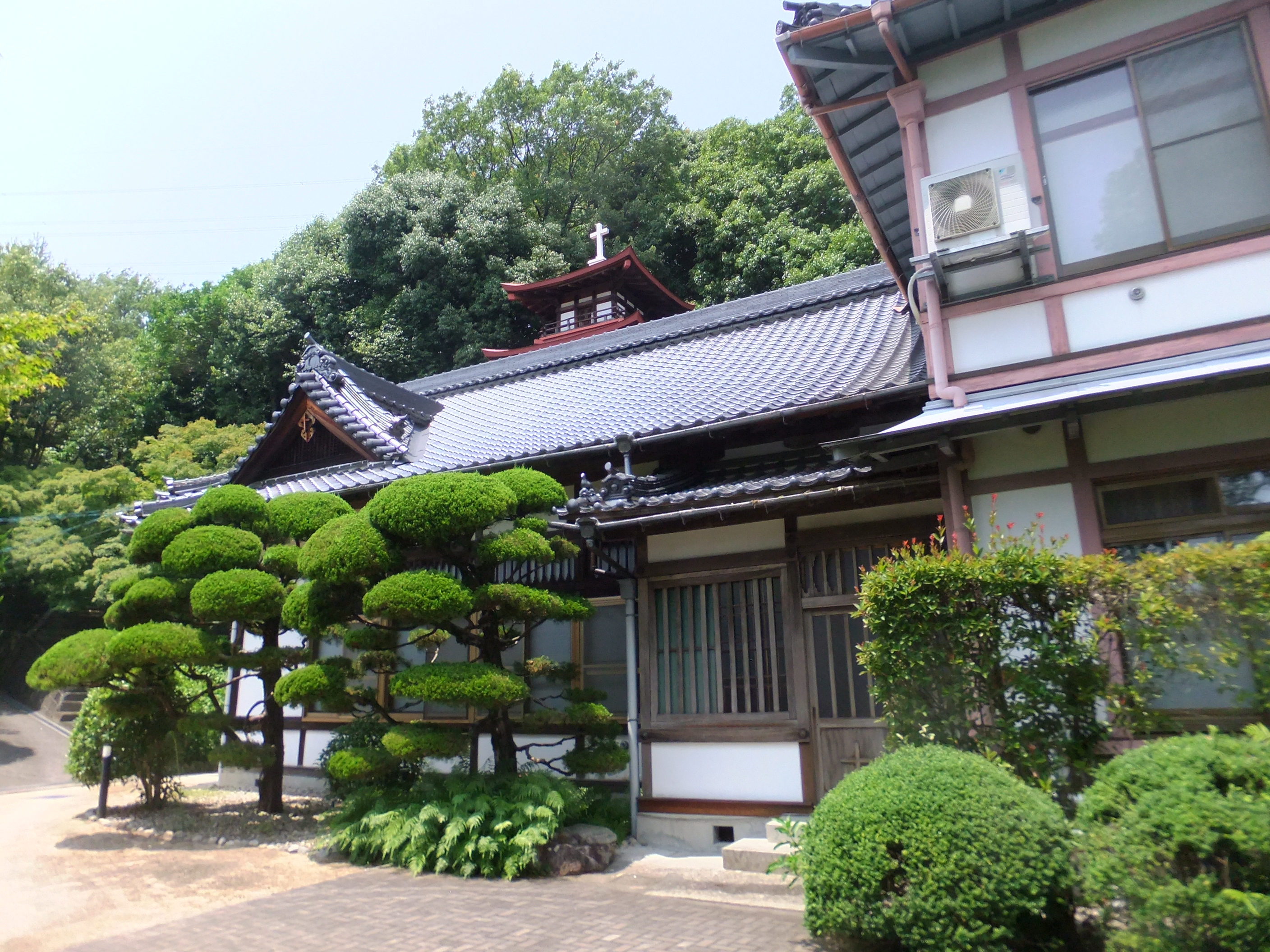 イエズス会長束修道院